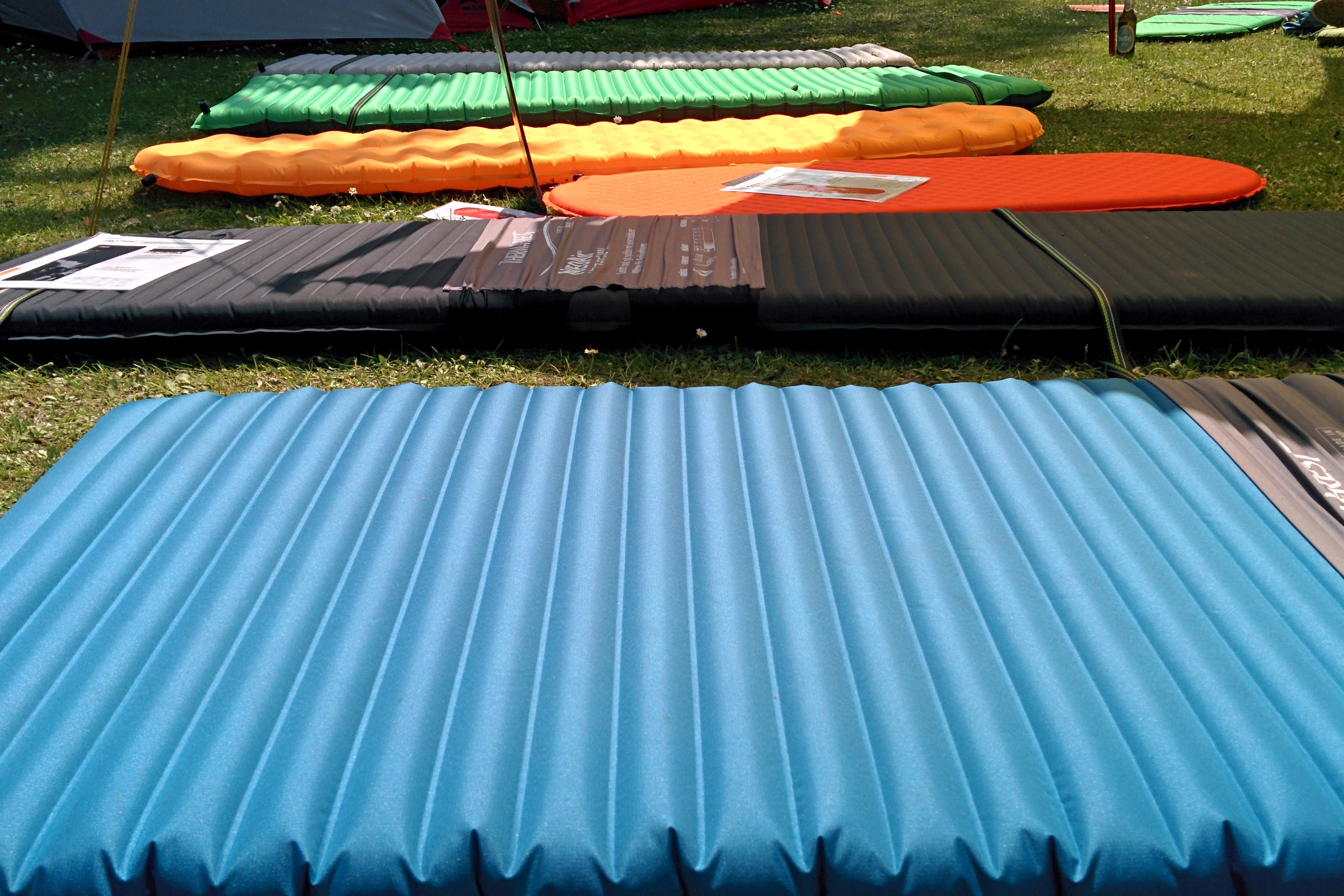 Selbstaufblasende Isomatten bei der GlobeBoat 2015